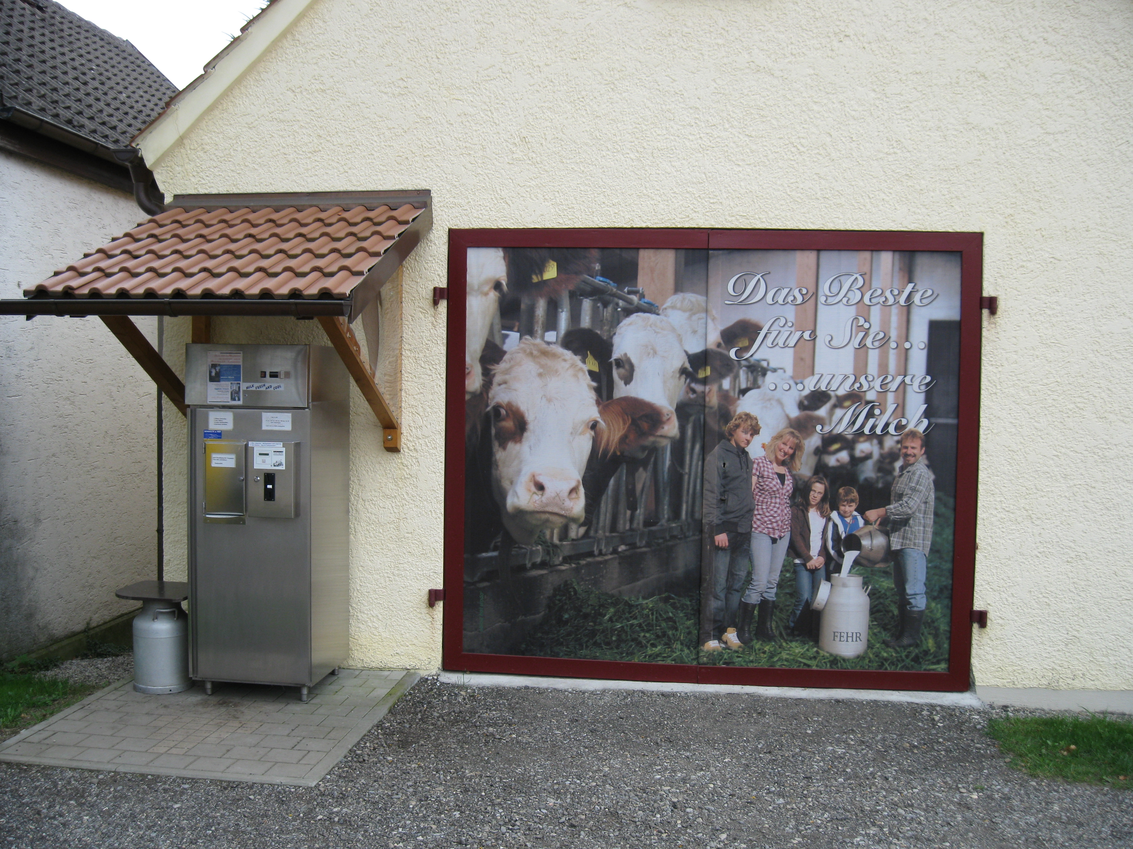 Milchtankstelle Familie Fehr in Tannheim, 2012